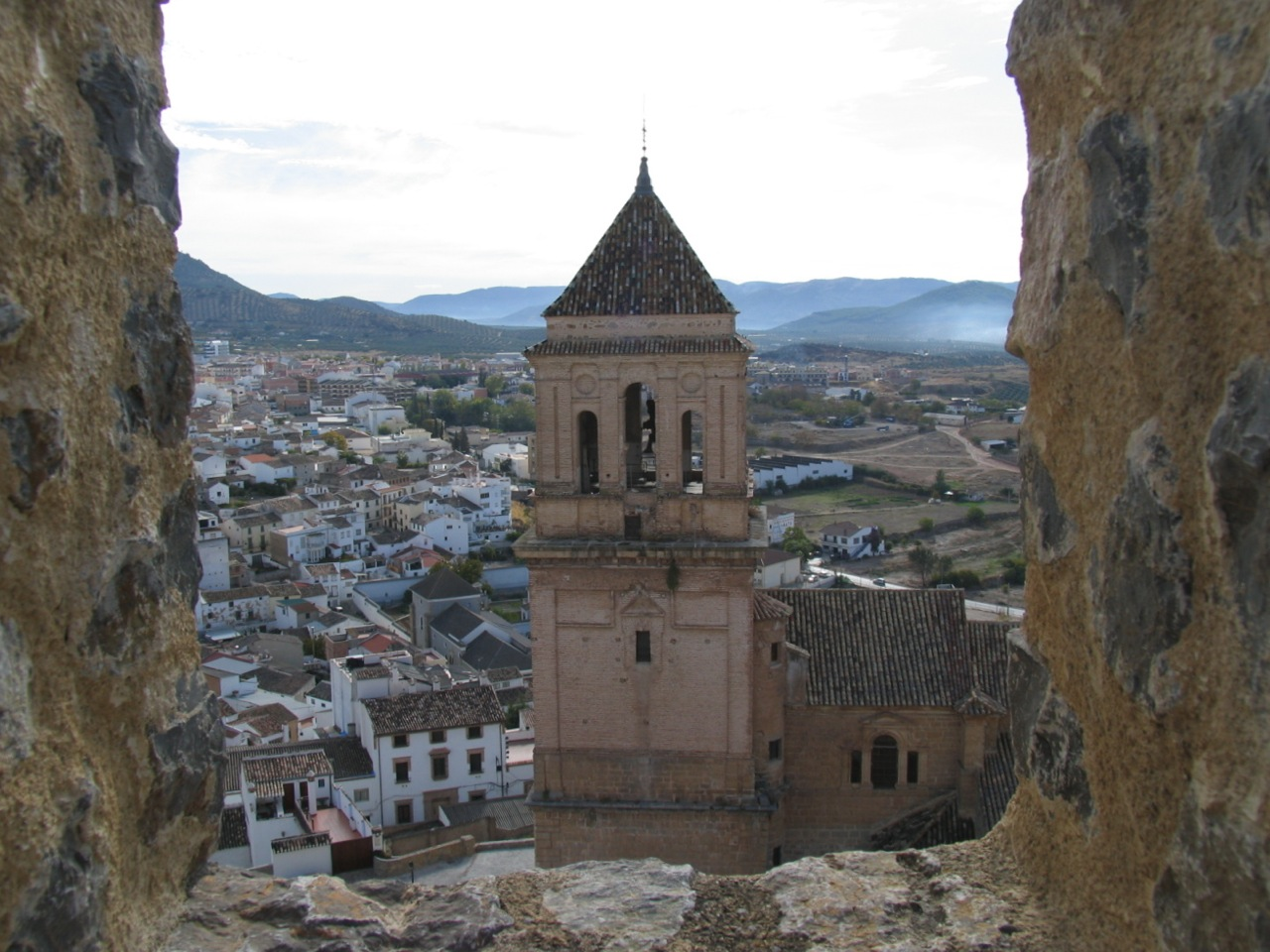 Torre de la iglesia desde el castillo de Alcaudete